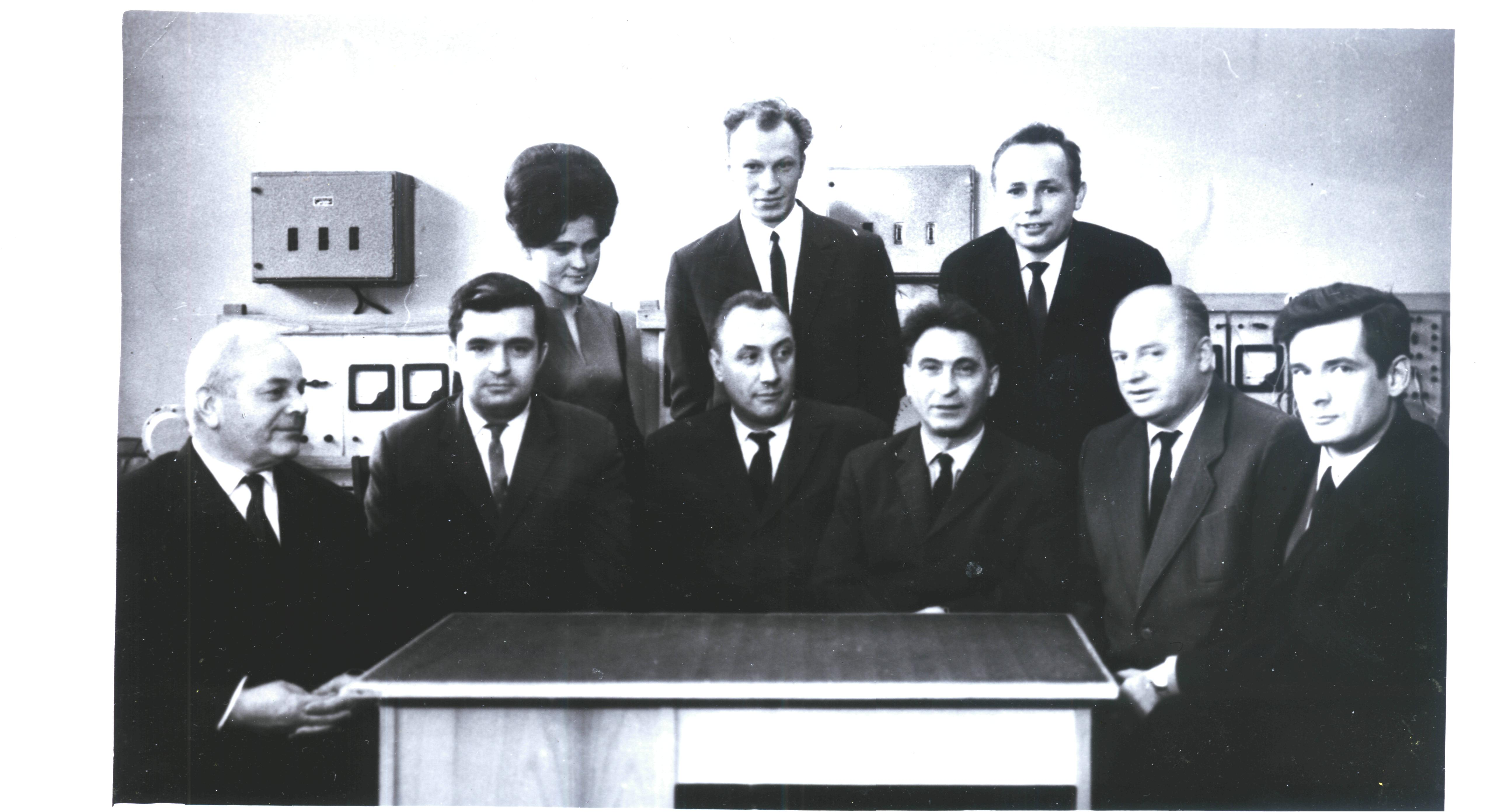 Китаев В.Е., Бокуняев А.А., Колканов М.Ф., Шевелев В.С., и др. Кафедра ЭПУ МЭИС